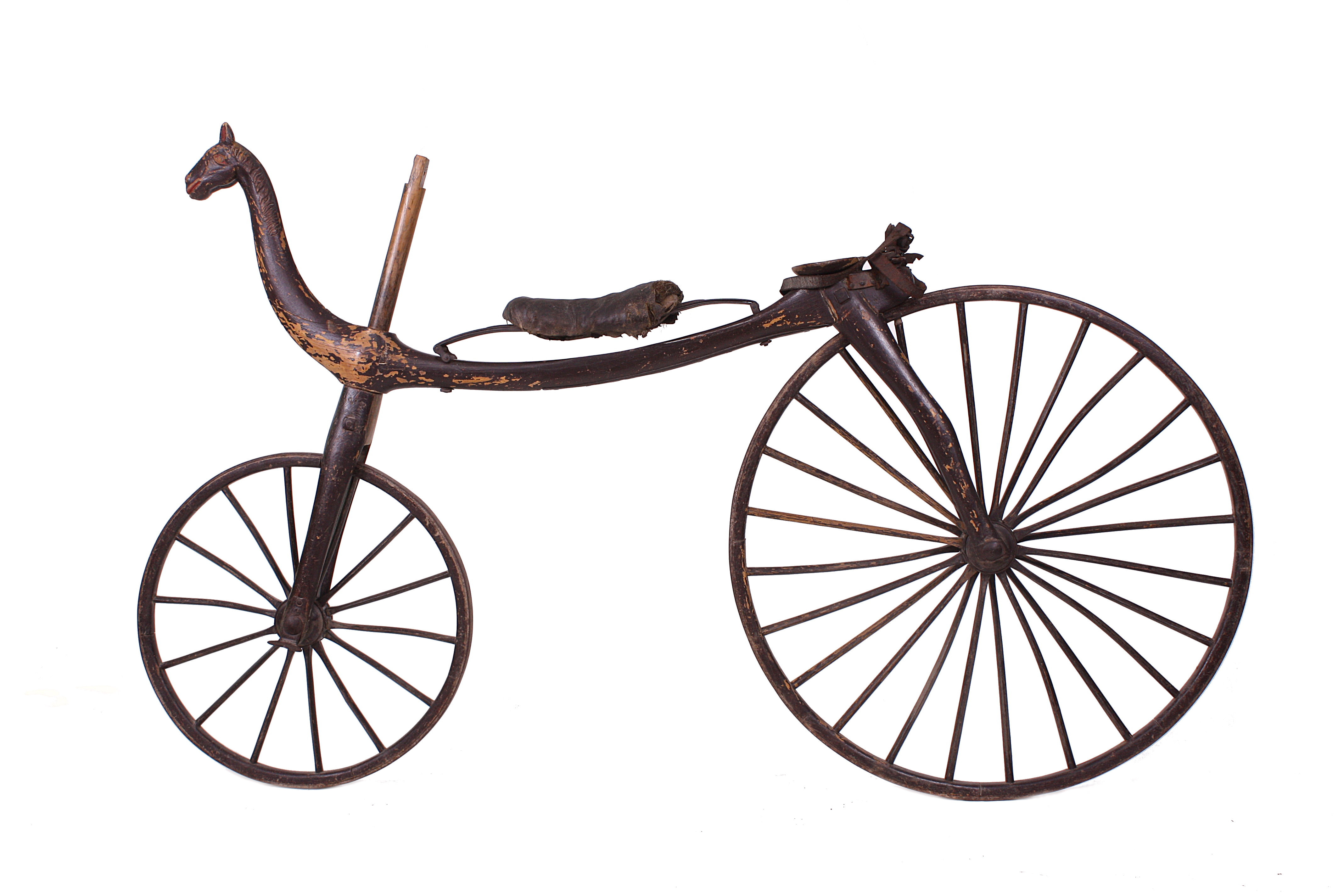 Draisienne zoomorphe - Monument Historique